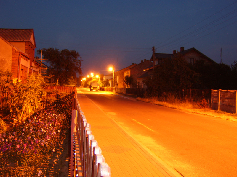 Niżankowice w nocy